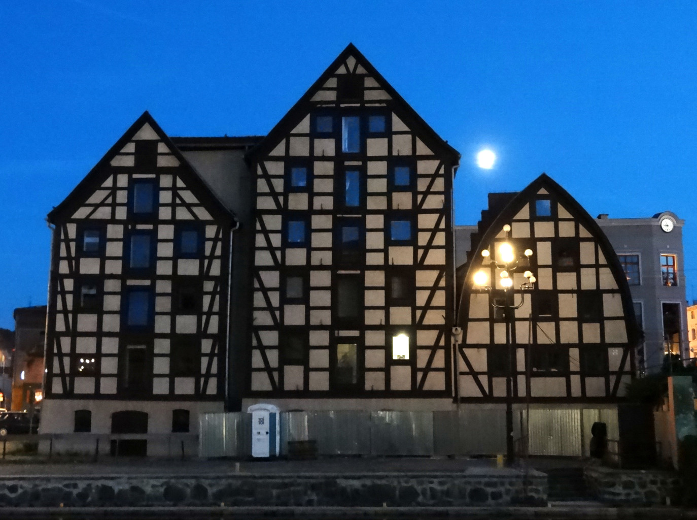 Spichrze nad Brdą w Bydgoszczy, zbud. w latach 1793-1800, od 1964 r. w gestii Muzeum Okręgowego